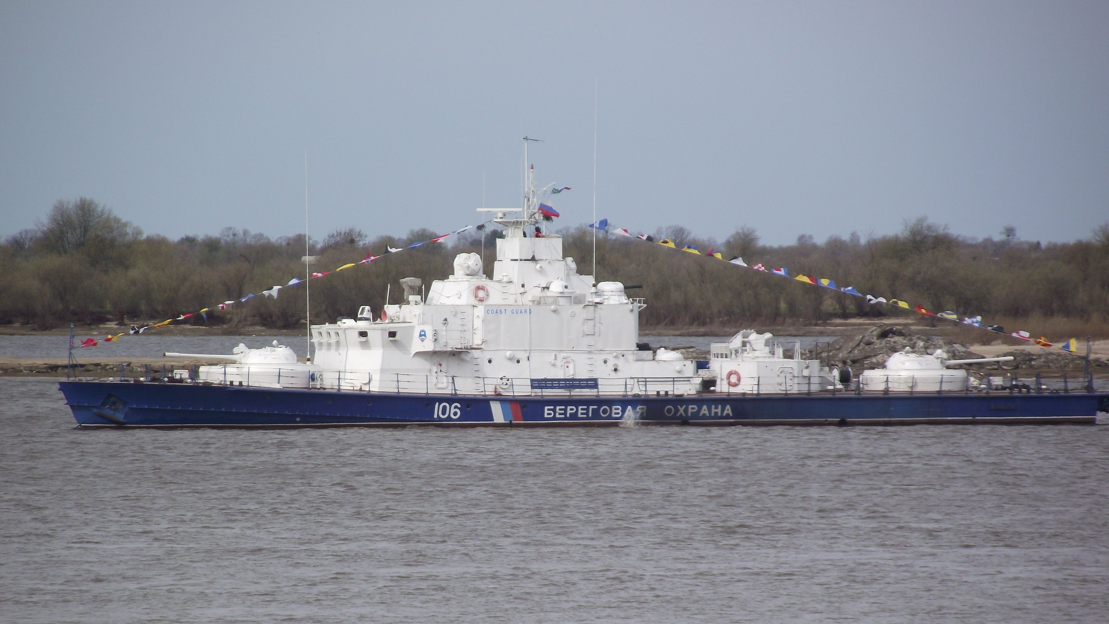 Корабль Амурской флотилии